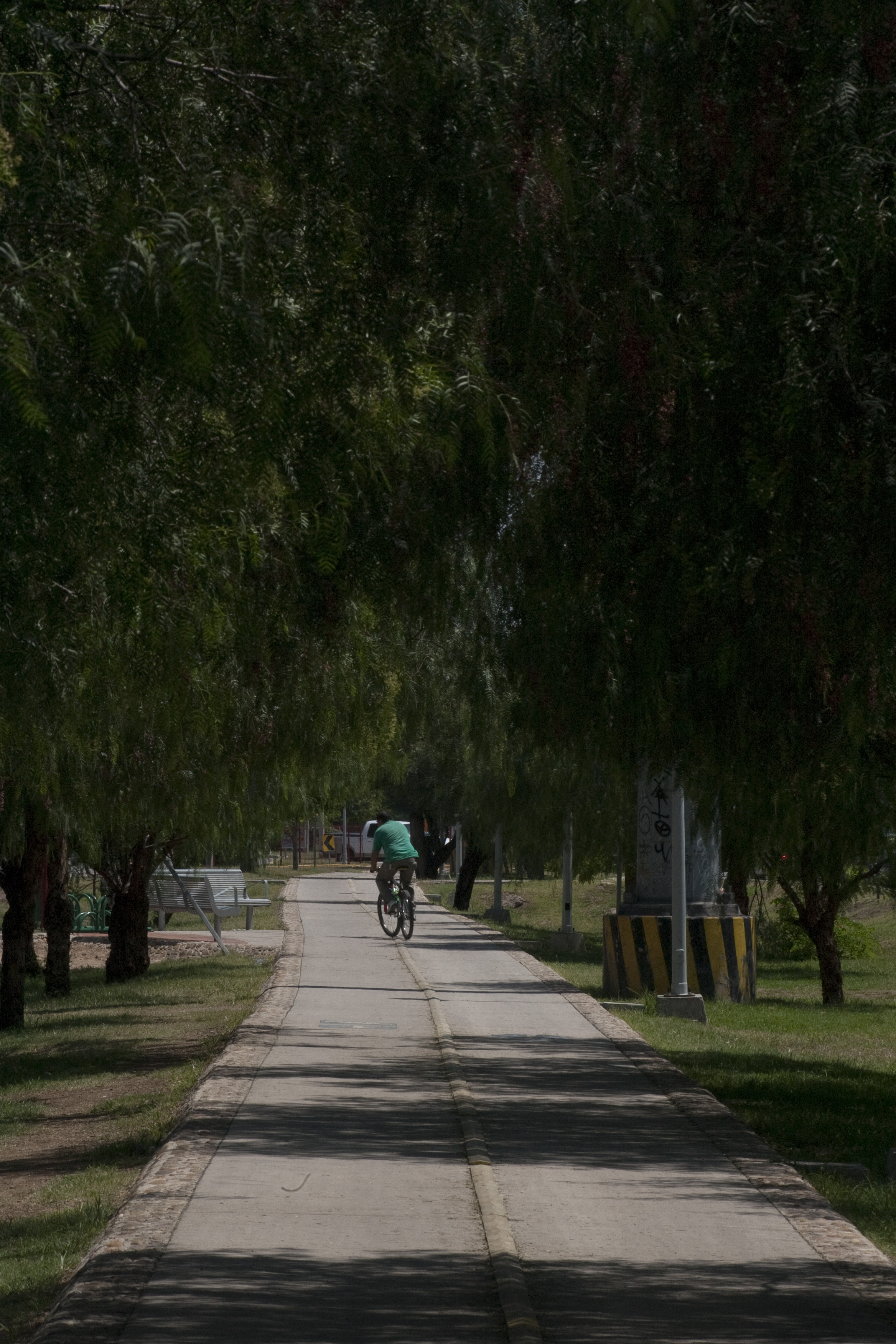 Ciclovias de la ciudad de León conforman un cicloférico .